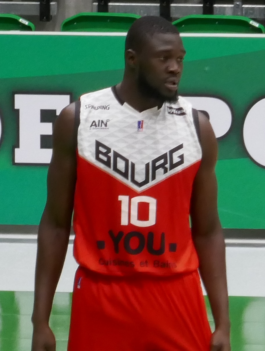 Youssou Ndoye